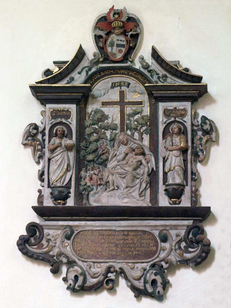 Montabaur, St. Peter in Ketten, Epitaph Foto 2013